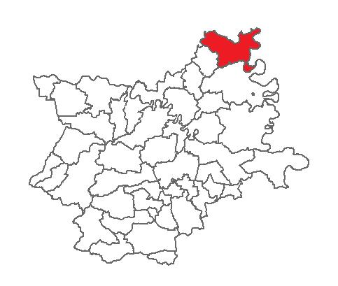 Općina Draž na zemljovidu Osječko-baranjske županije